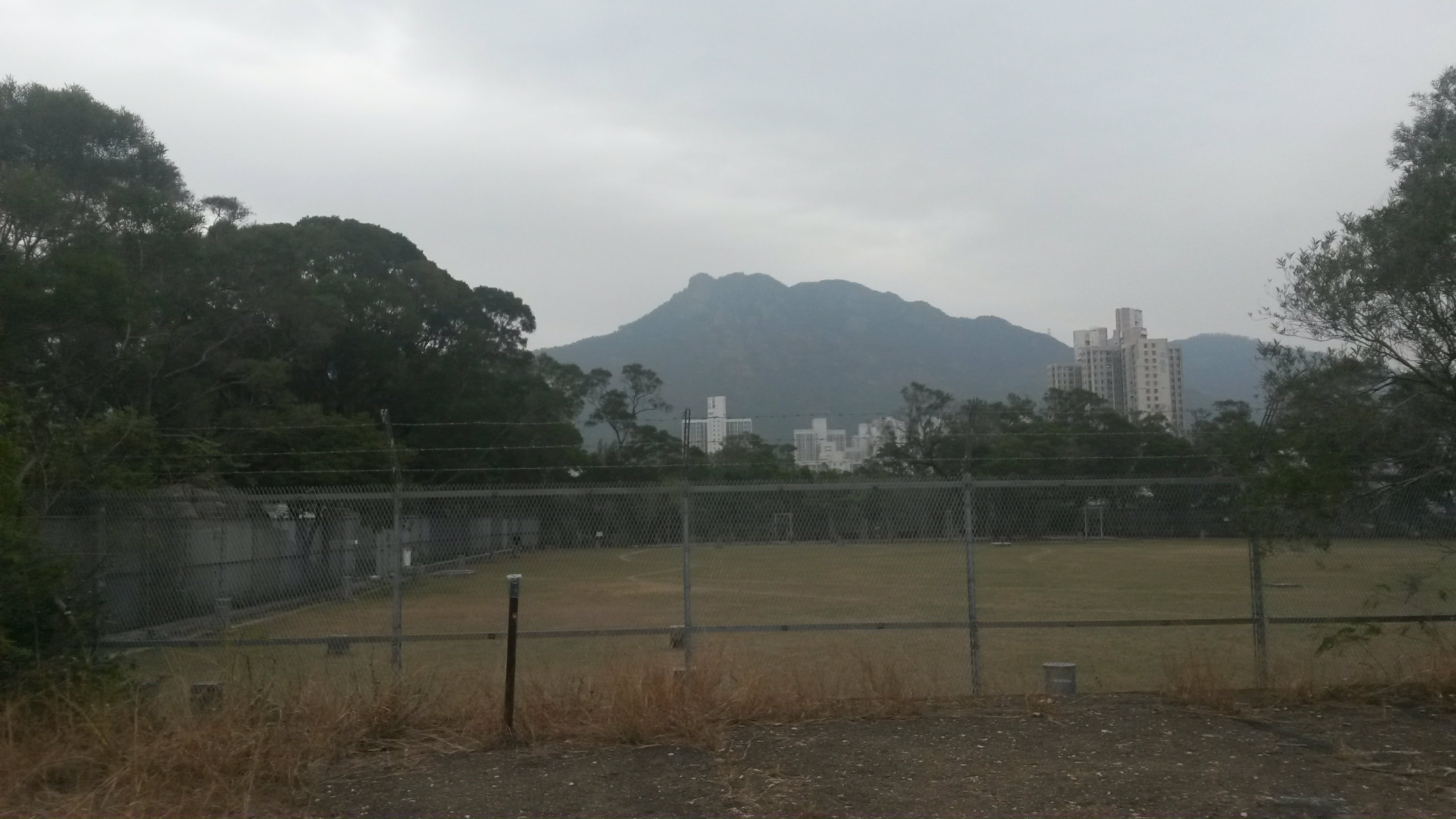 中文（香港）: 格仔山配水庫